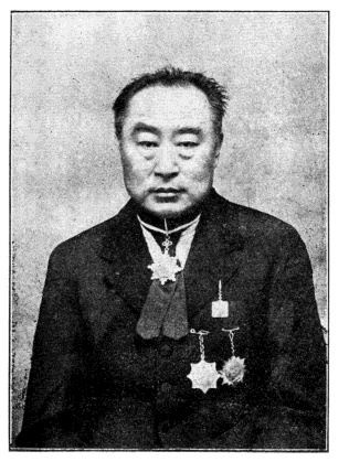 中華民國國會議員